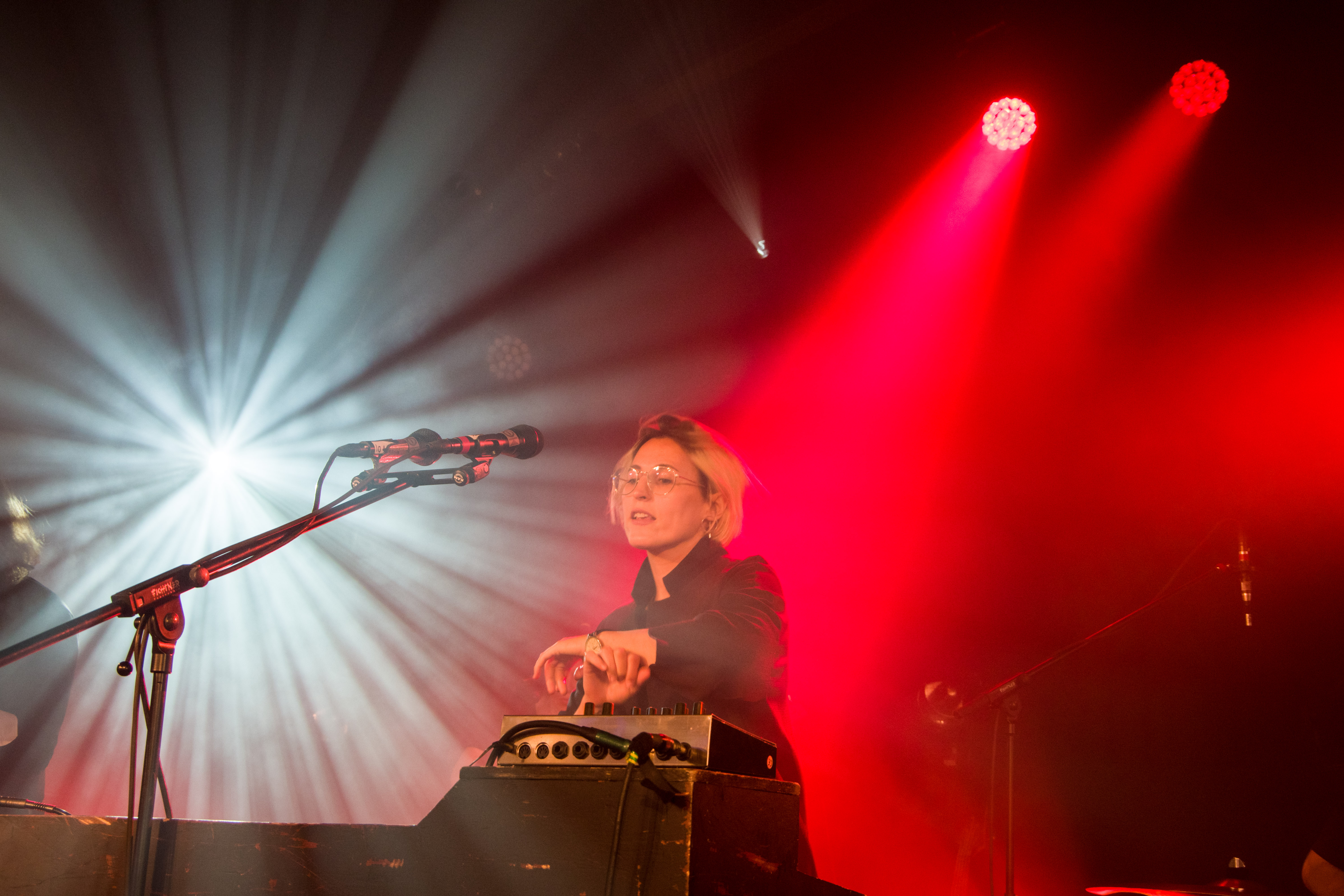 Das Zelt-Musik-Festival 2017 in Freiburg im Breisgau 16.07.2017 Mine